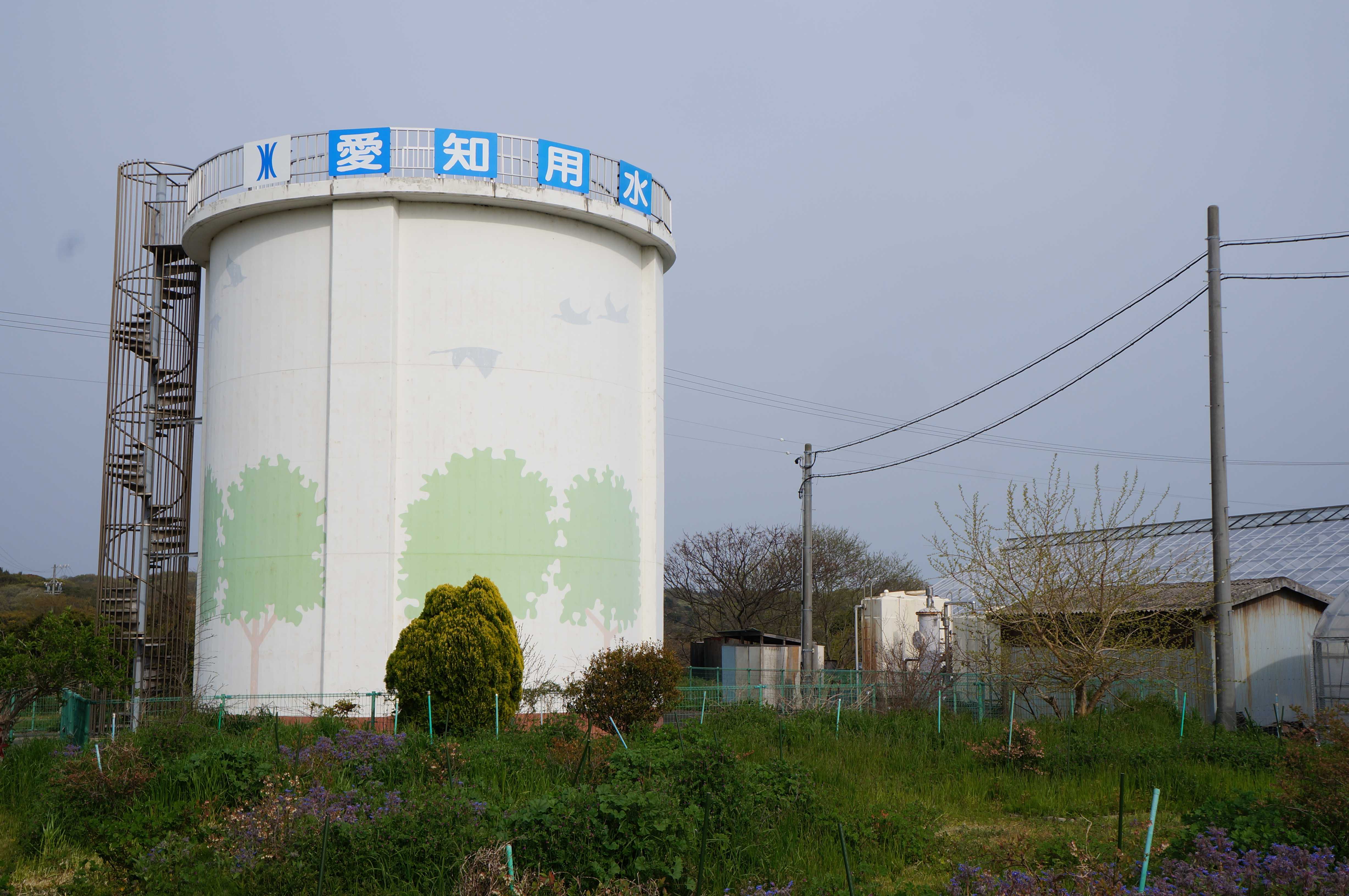 鵜の池付近にある愛知用水のタンク（愛知県知多郡南知多町上野間）